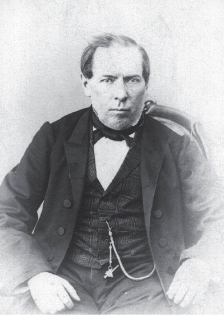 Купец Франц Осипович Шехтель (дядя архитектора)